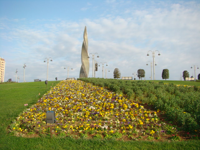 Musiqili alov fəvvarəsi — Bakı şəhərində "Koroğlu" metrostansiyası yaxınlığında fəvvarə